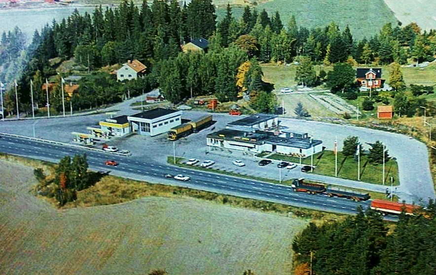 Sävsta motell vid gamla E18 (Rikstolvan) i slutet av 1960-talet